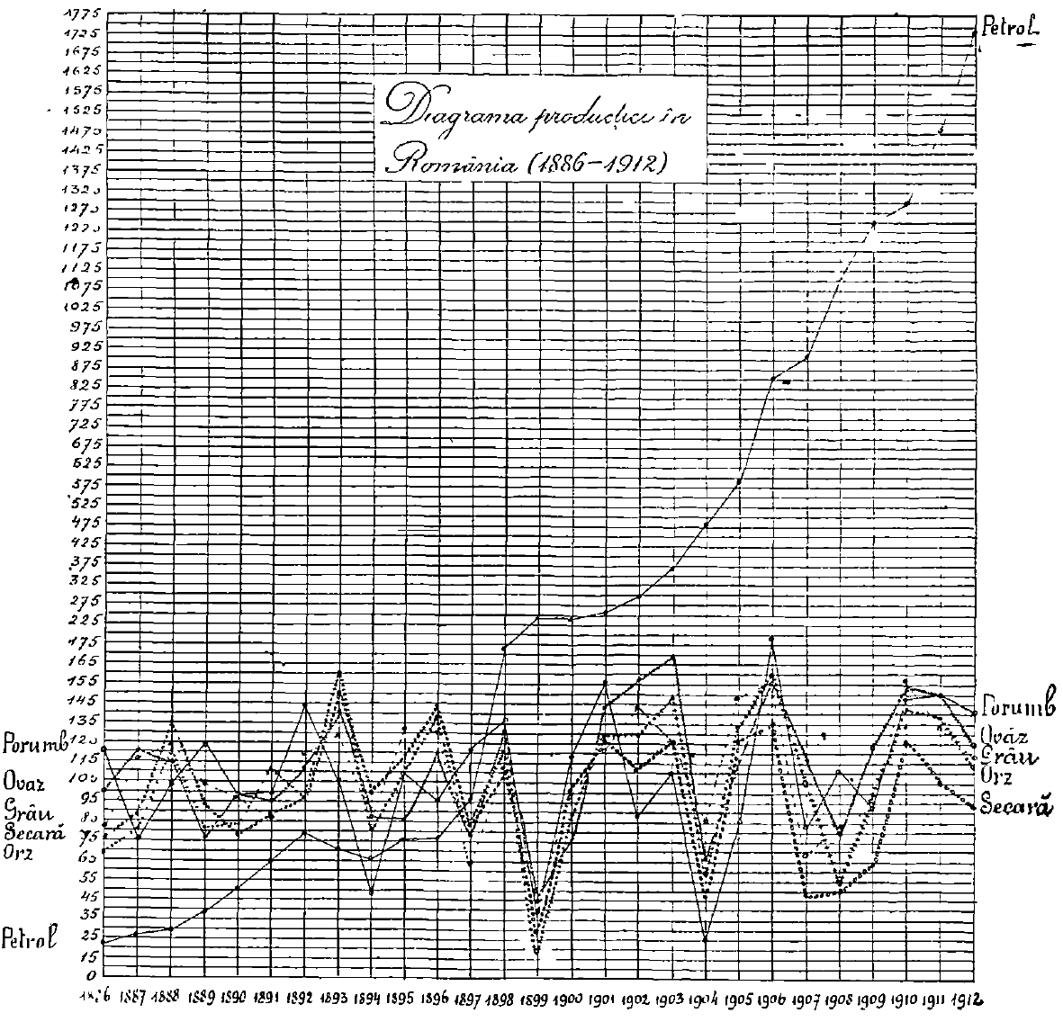 Graficul productiei de cereale in România - 1886-1912 Sursa: Angelescu, Ion N., Cunoașterea și conducerea pieții economice. Studiu istorico-statistic asupra evoluției economice a popoarelor, Institutul de Editură si Arte Grafice „FLACĂRA”, București, 1914 Restrictii: Fără restrictii datorită vechimii